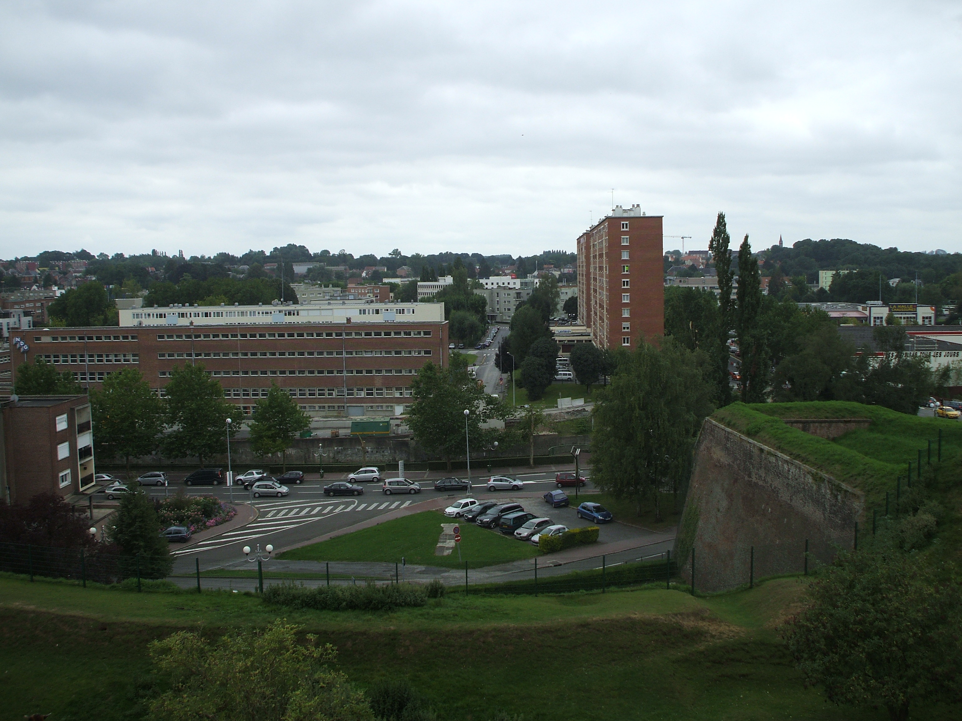 vue de maubeuge depuis le zoo nord france